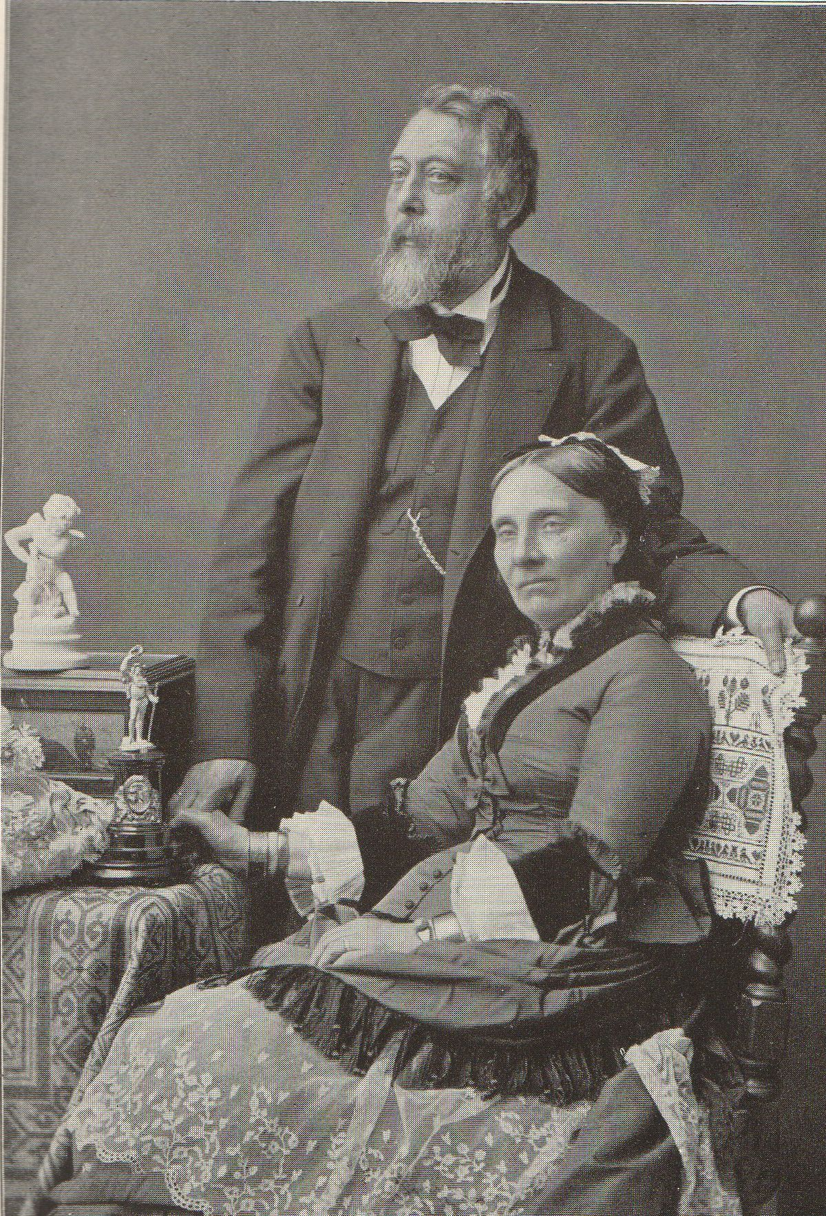 Gustav Gans zu Putlitz (1821-1890) und seine Ehefrau Elisabeth, geb. Gräfin Königsmarck (1825-1901)